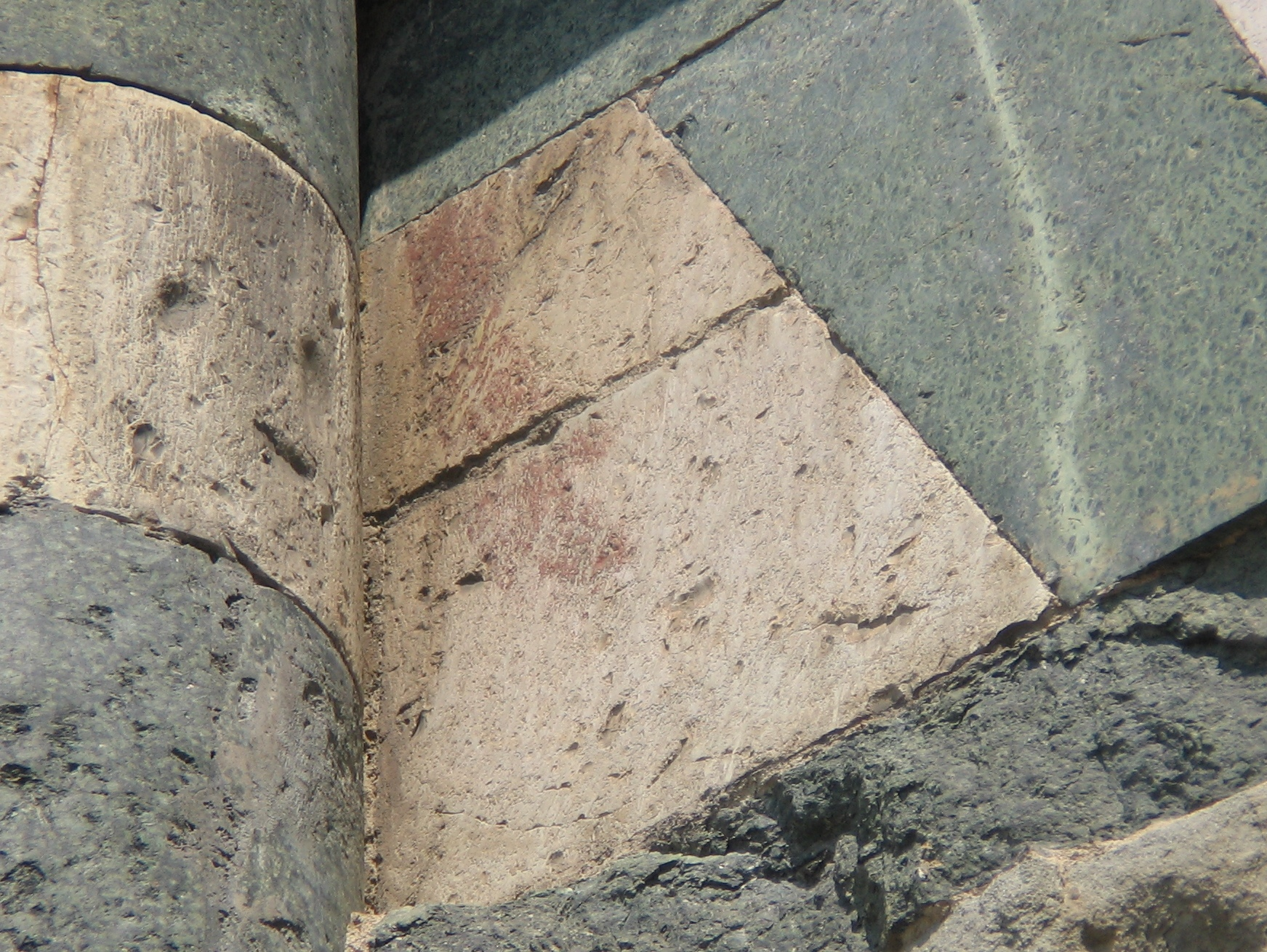 Il segno della mano di Musciatto